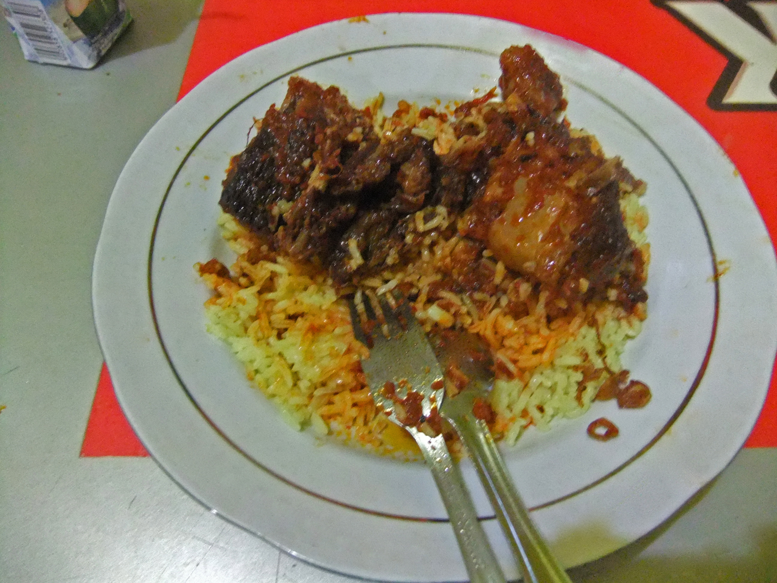 Nasi kuning lauk ikan haruan di Lontong Orari, Banjarmasin